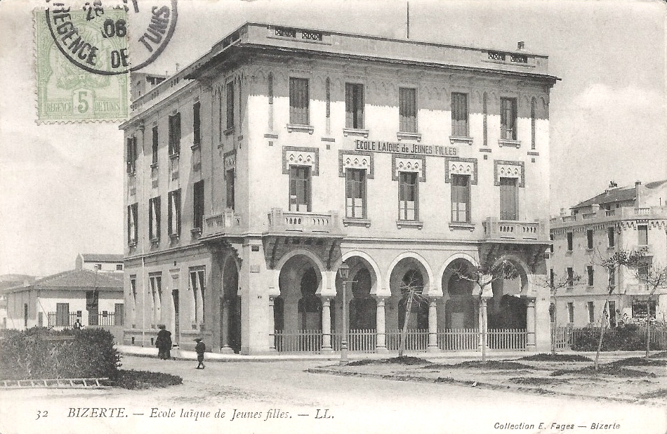 Bizerte (Tunisie), école laïque de jeunes filles, 1905.